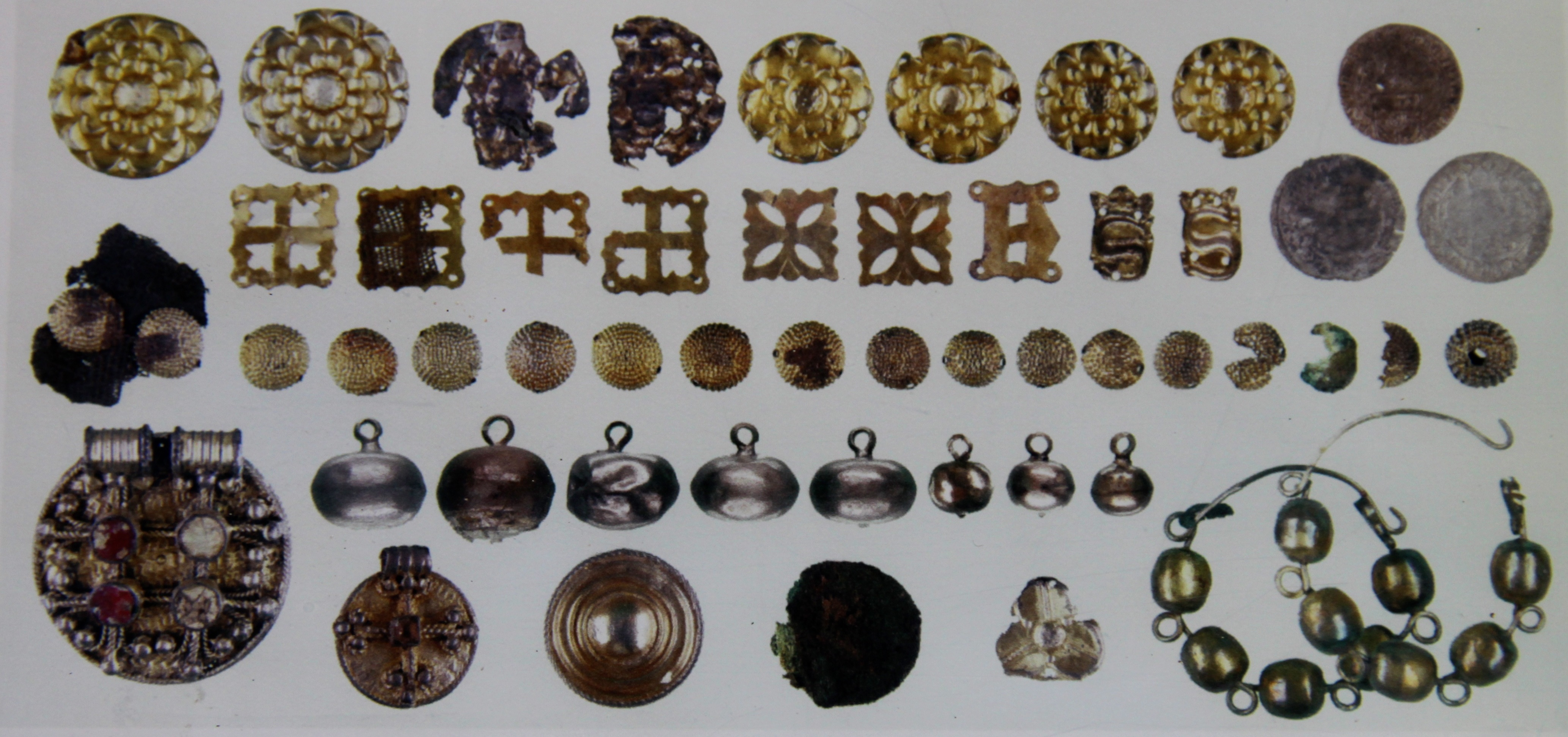 Schatzfund vom Kloster Barthe (Abbbildung auf einer öffentlich zugänglichen Hinweistafel im Heseler Wald)